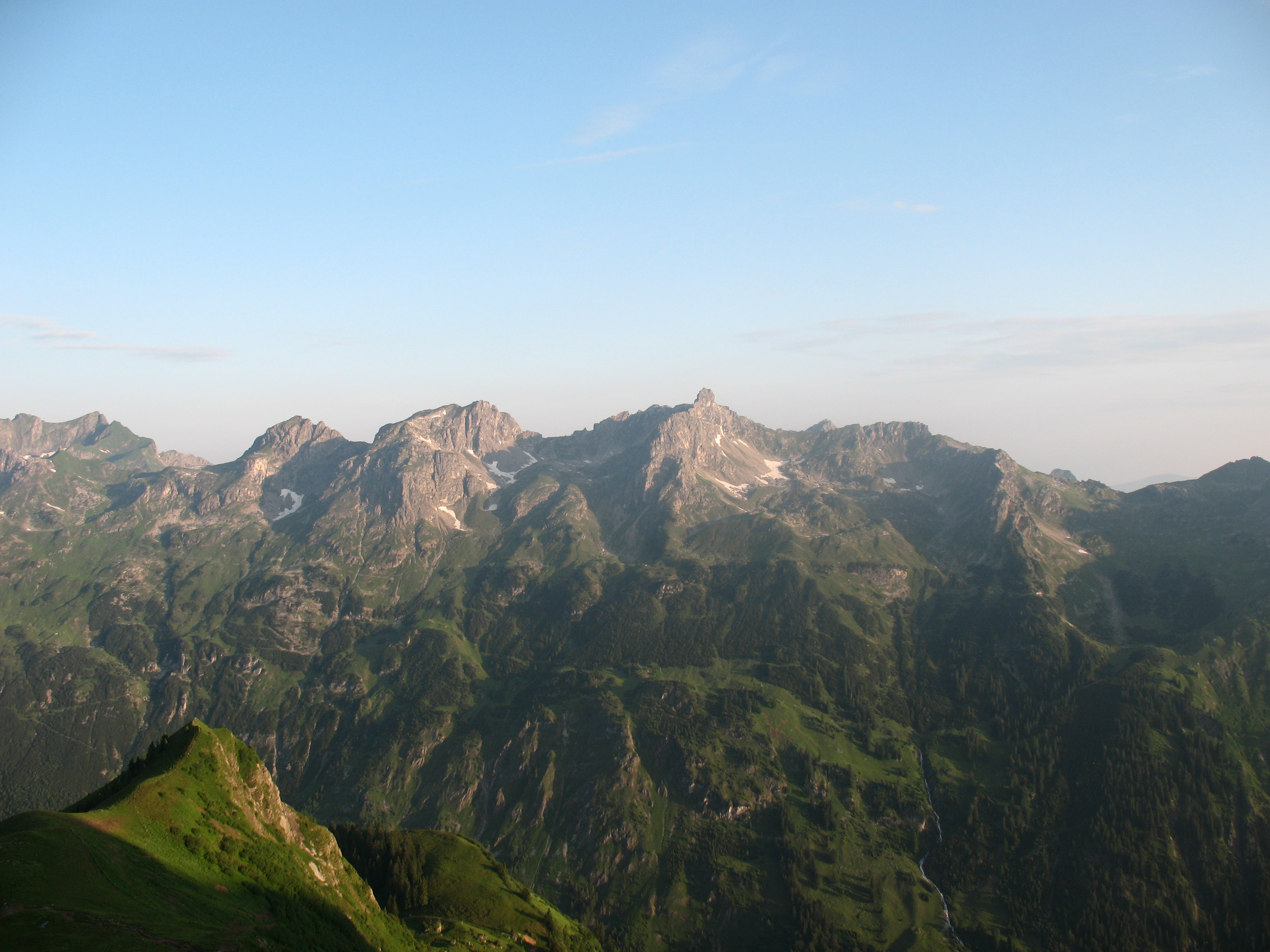 Blick von der Rappenseehütte über den Mußkopf (1968 m) zu den Schafalpenköpfen (Erster (2272 m), Zweiter (2302 m) und Dritter (2320 m))